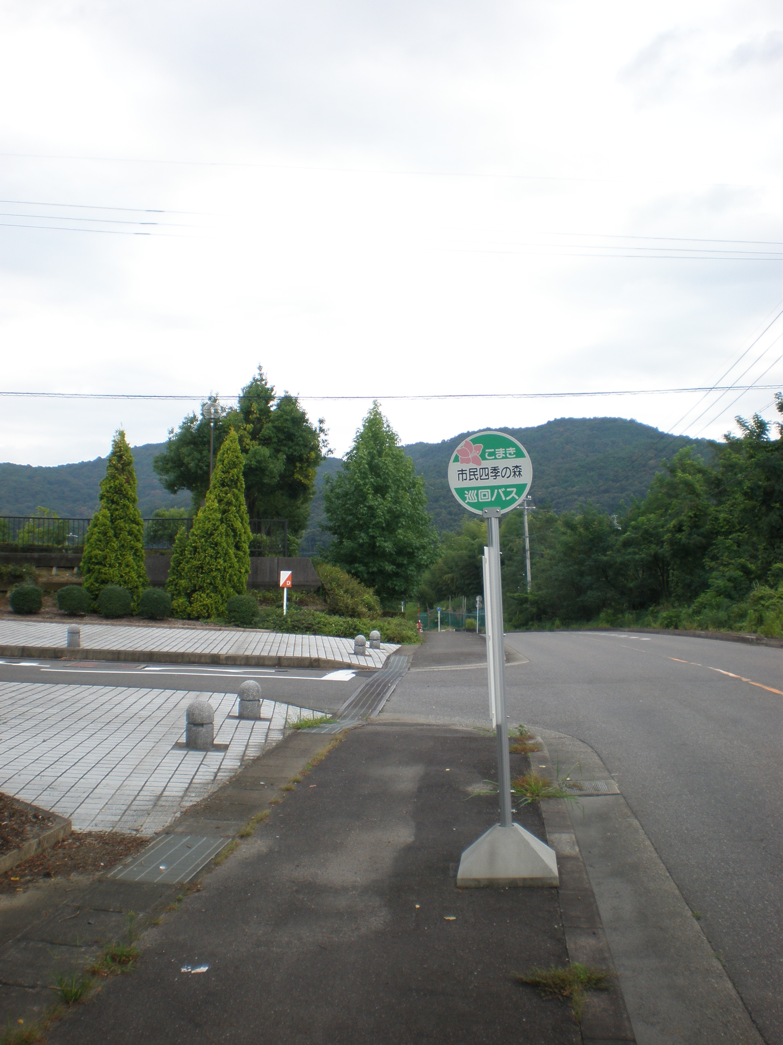 愛知県小牧市にある市民四季の森停留所